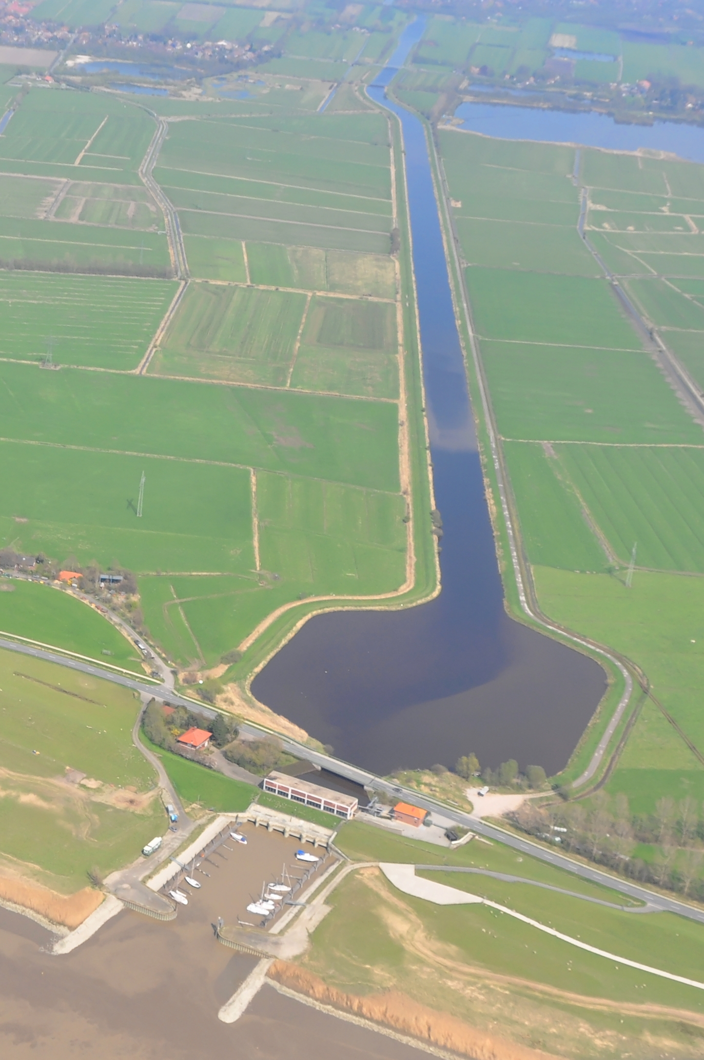 Luftbilder von der Nordseeküste 2013-05